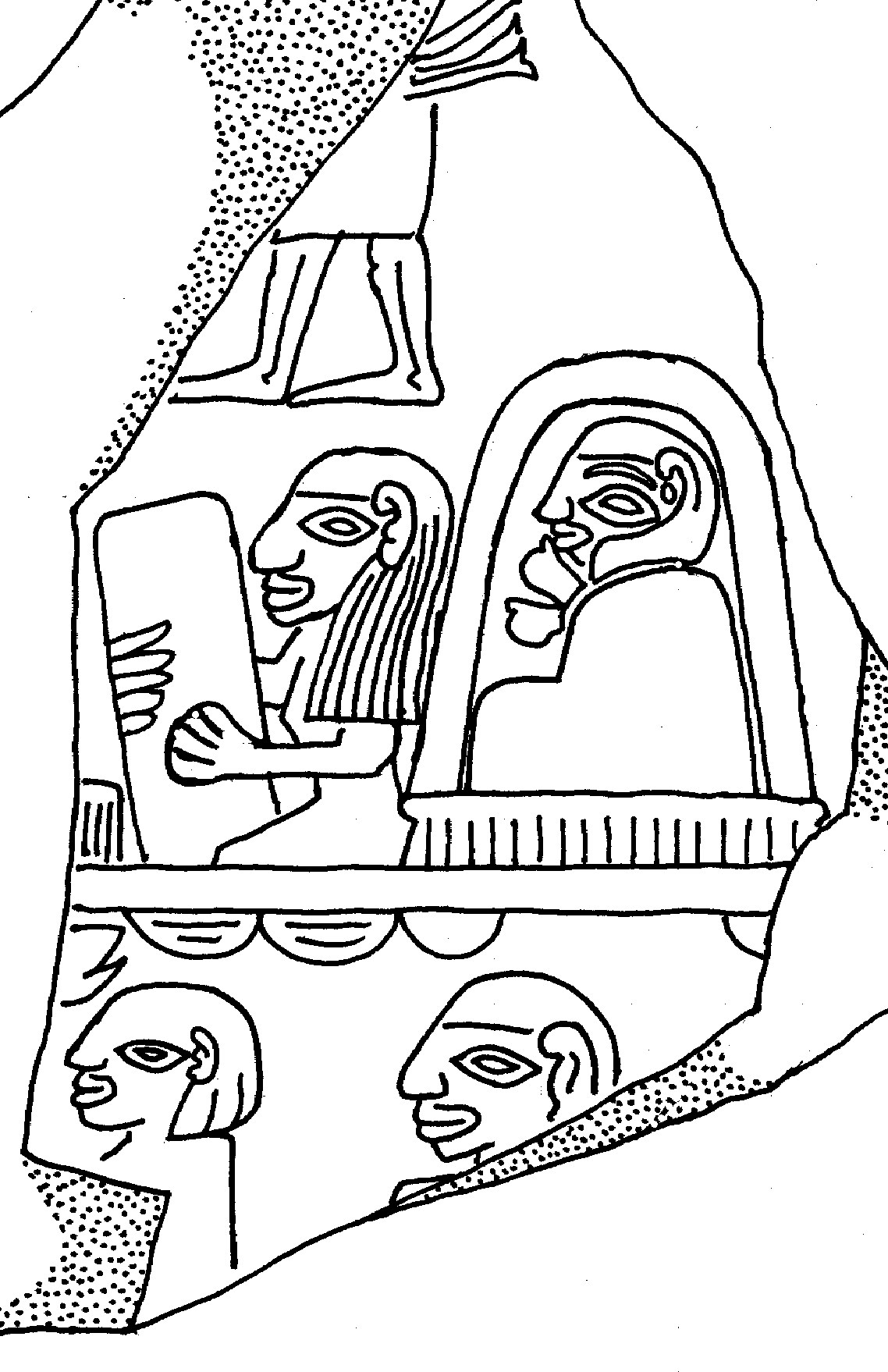 Shard of an ceremonial palette from prdynastic times, it shows the Reput-shrine